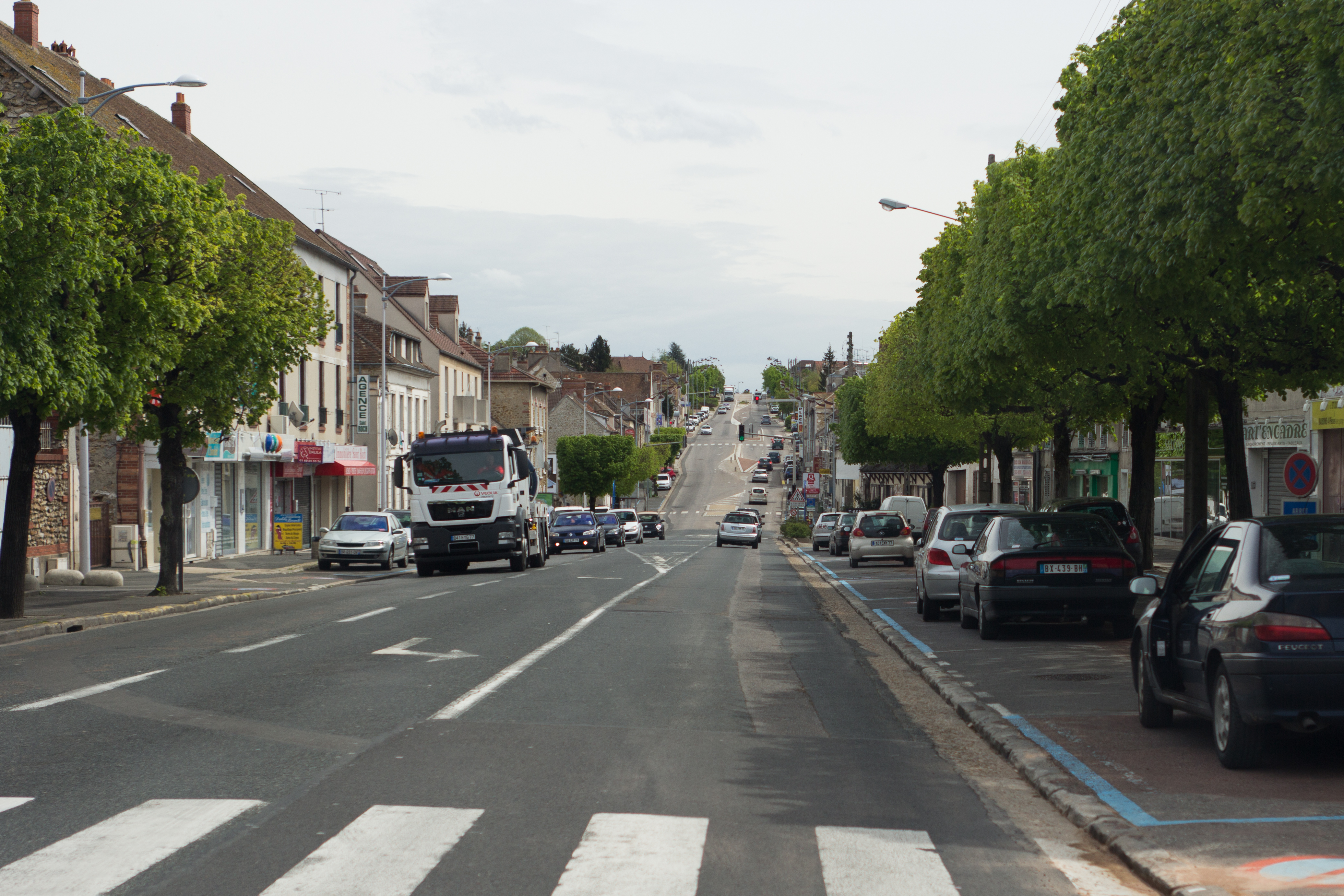 Ancienne Route N7 dans sa traversée de Saint-Fargeau-Ponthierry (Centre-ville). Saint-Fargeau-Ponthierry, Seine-et-Marne, France